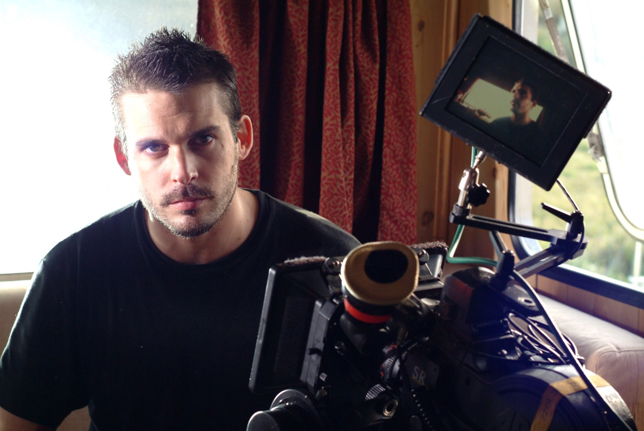 Enrico Silvestrin, attore, deejay, presentatore televisivo e cantautore romano (2004)